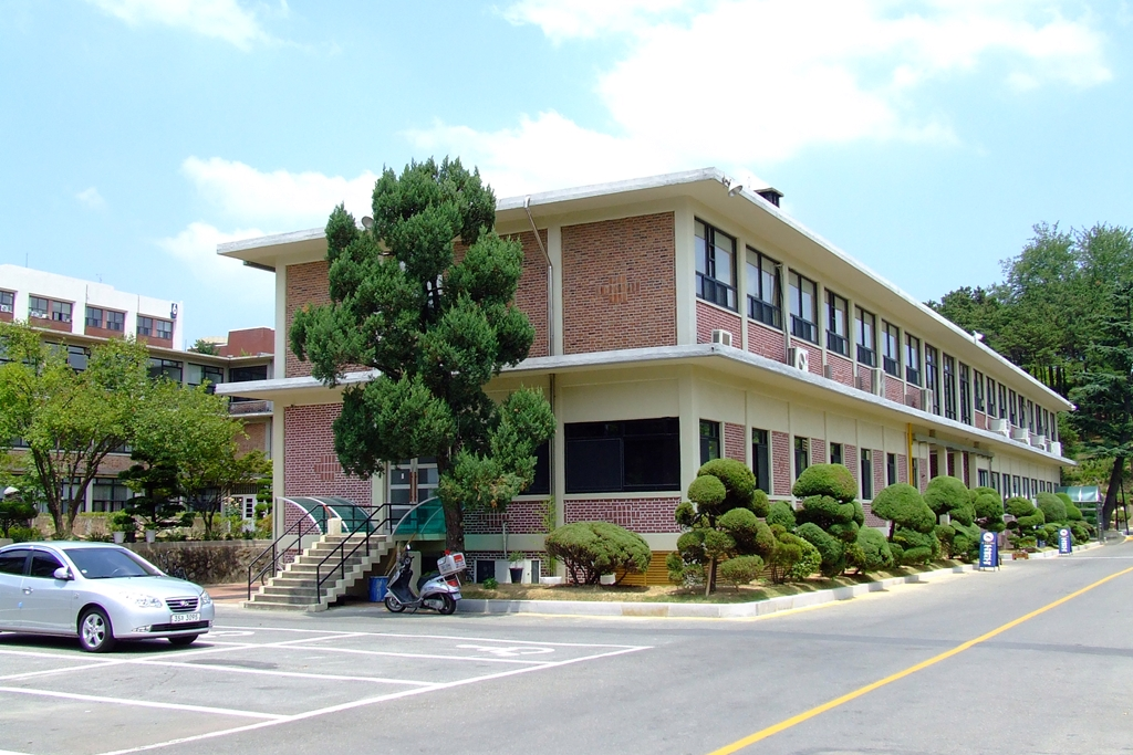 한남대 본관